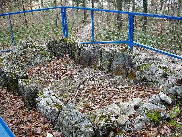 Dolmen - Aesch - Kanton Baselland - Schweiz